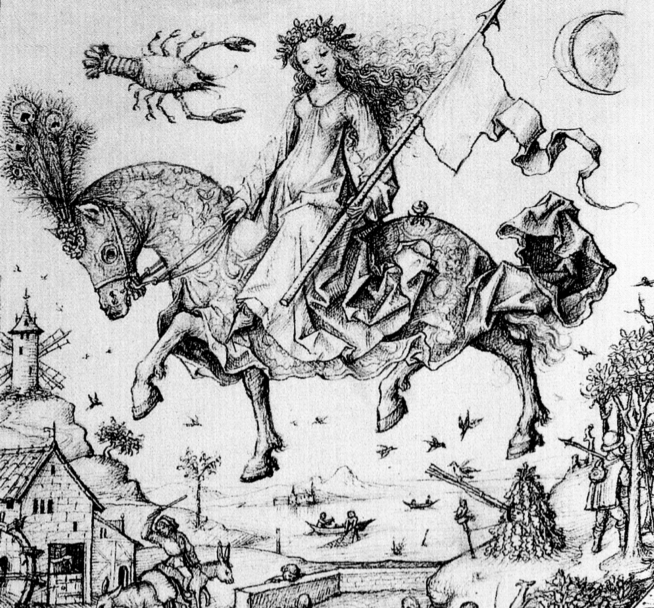 Luna und ihre Kinder (Detail: Lunar mit Schimmel), Mittelalterliches Hausbuch von Schloss Wolfegg, fol. 17r, (Fürstliche Sammlung — Kupferstichkabinett, Wolfegg)